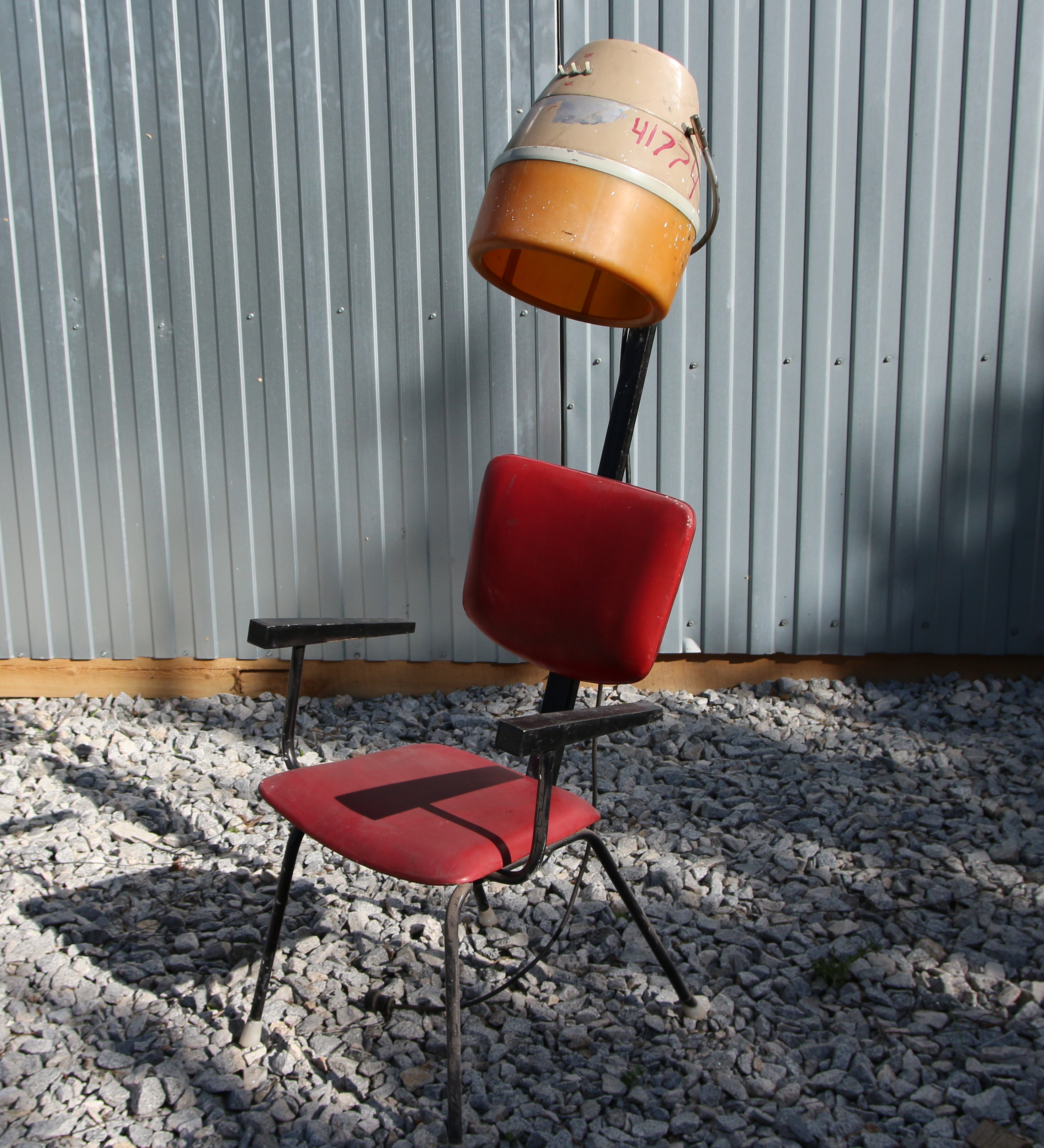 Аппарат для сушки волос (сушуар) производства МБО ЭССР ОМЗ "терас" 1986 год. РСТ ЭССР 222-74. Аппарт имеет асинхронный двигатель и два нихромовых нагревателя открытого типа.